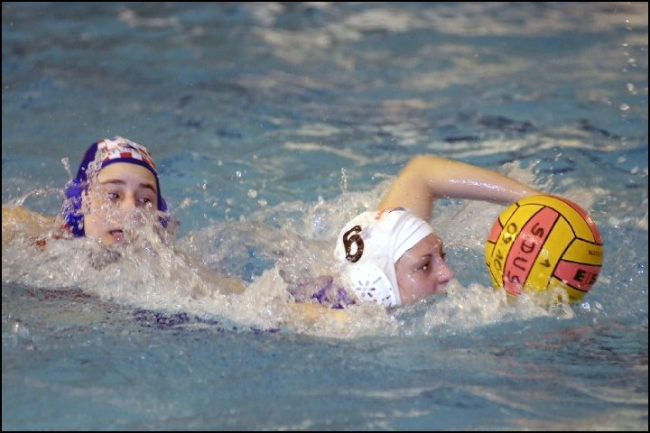 Gaelle du SDUS waterpolo en action.